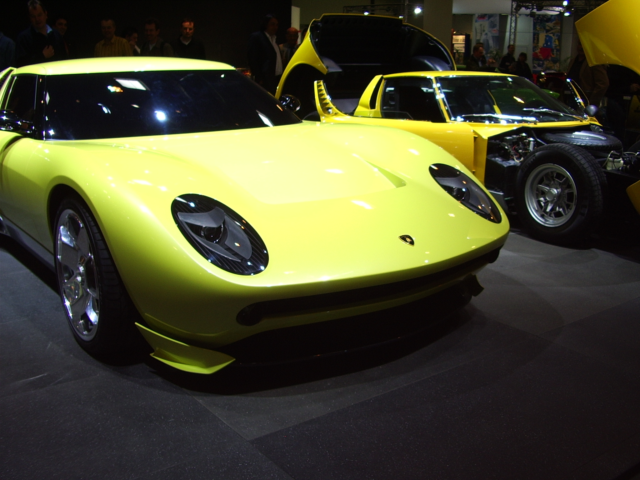 Lamborghini Miura Concept, Technoclassica Essen, 2006 Quelle: Privat